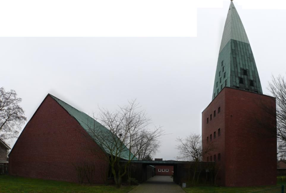 Apostelkirche (Bocholt) Autostitch, eigenens Bild